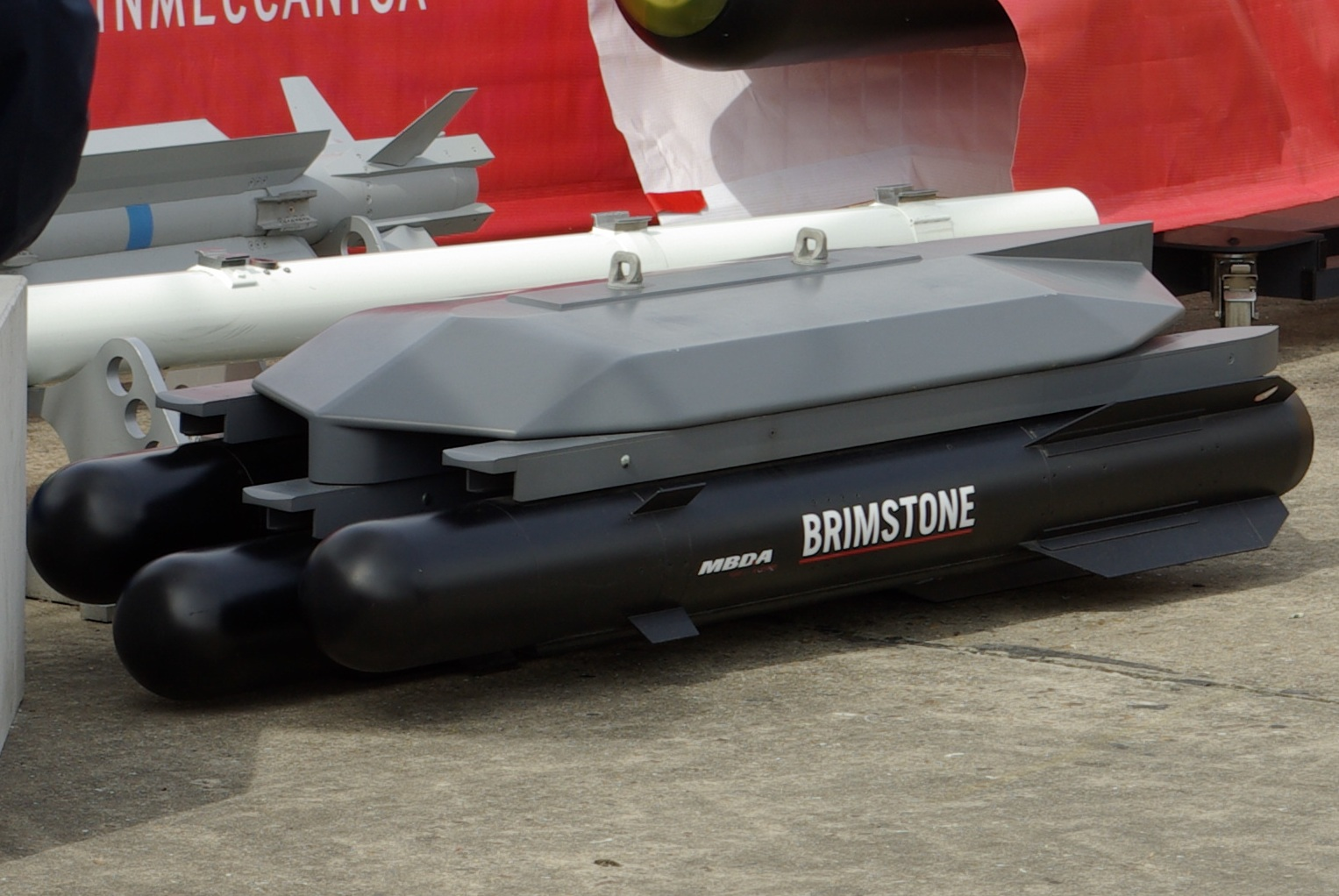 Missiles MBDA Brimstone